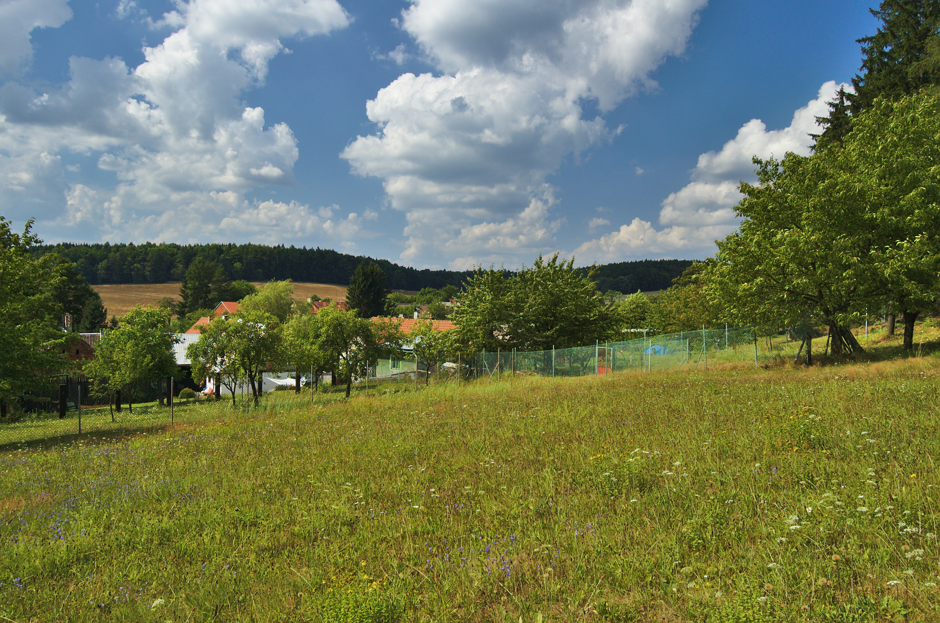 Pohled na obec od jihu, Ospělov, Ludmírov, okres Prostějov